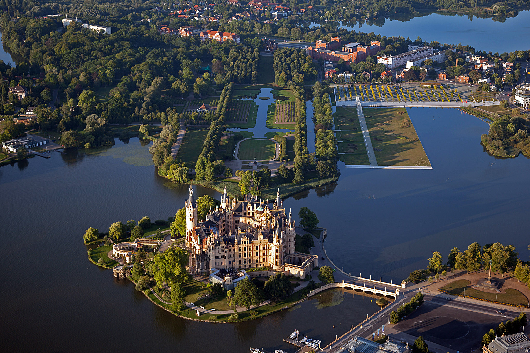 Schweriner Schloss, Schwerin, Germany Seen from a Balloon.